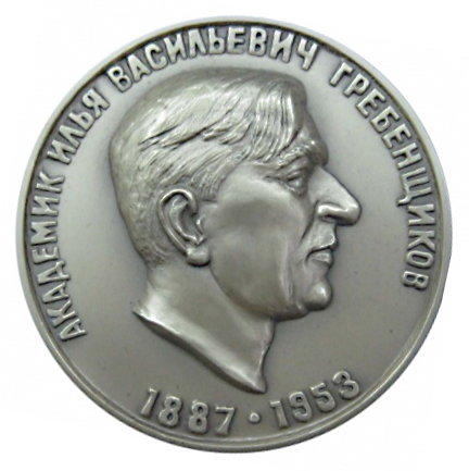 Медаль академика И.В.Гребенщикова